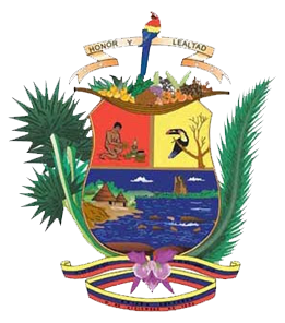 Escudo Estado Amazonas.